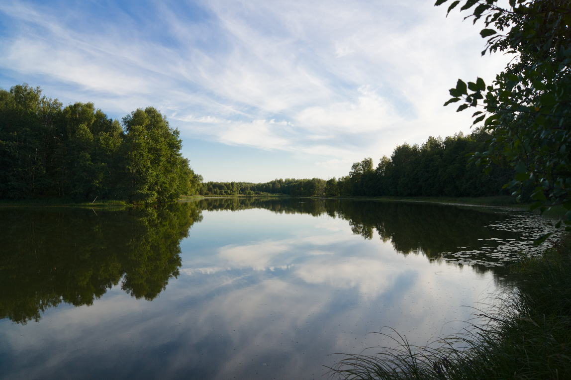 Река Виша, между деревнями Алешунино и Баландино.